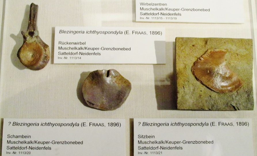 Fossil of Blezingeria, an extinct reptile - Muschelkalkmuseum Hagdorn